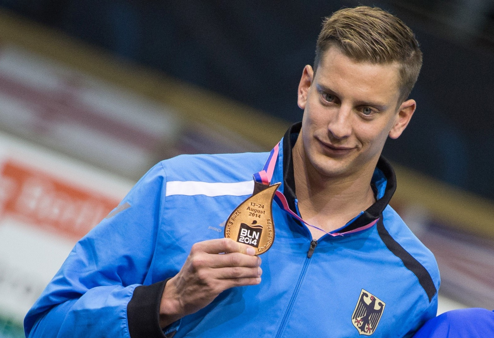 Jan-Philip Glania mit der EM Bronze Medaille 2014